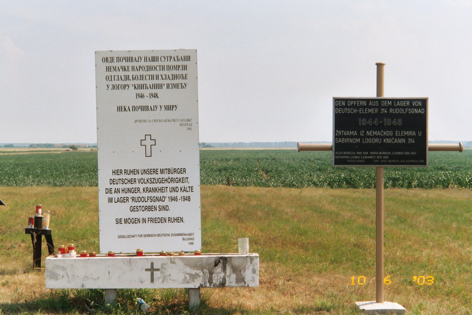 Rudolfsgnad